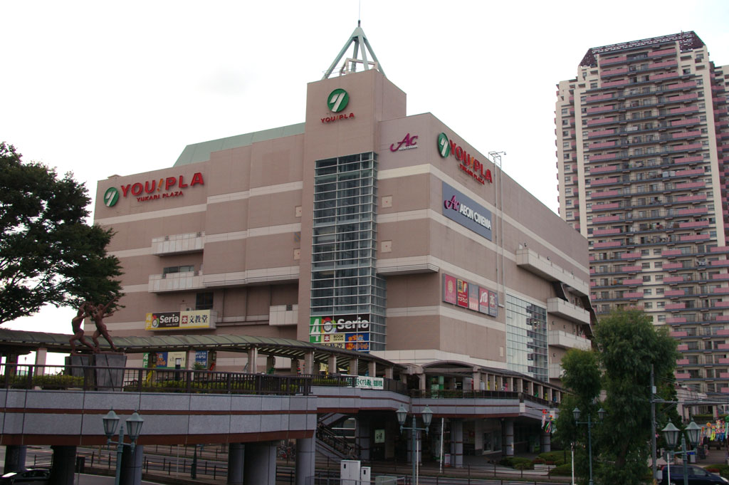 イオンシネマユーカリが丘外観